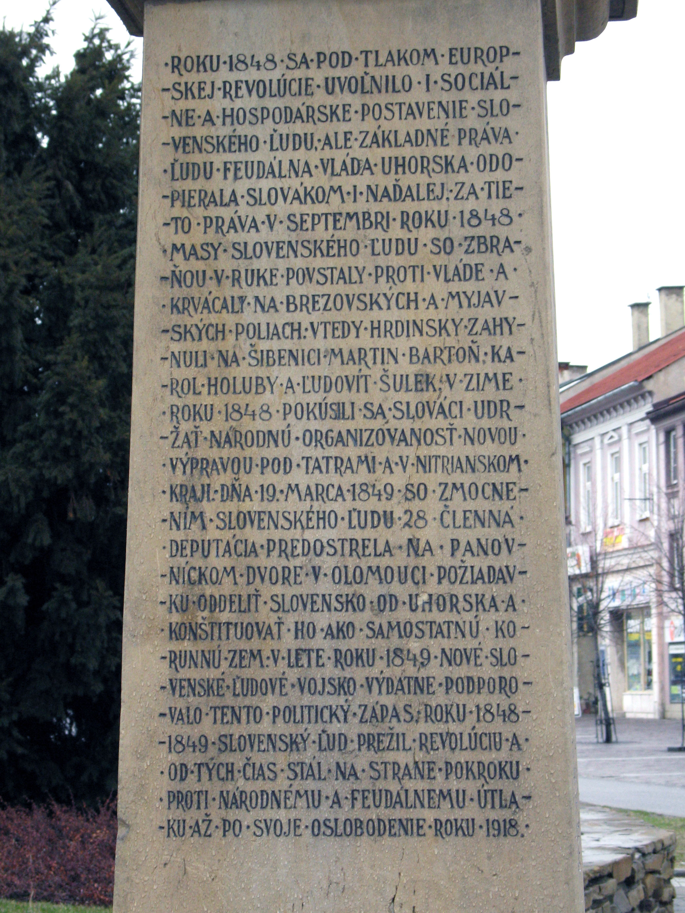 Tabuľa o meruôsmom roku v čase pôsobenia Janka Kráľa This medium shows the protected monument with the number 505-399/0 in the Slovak Republic.